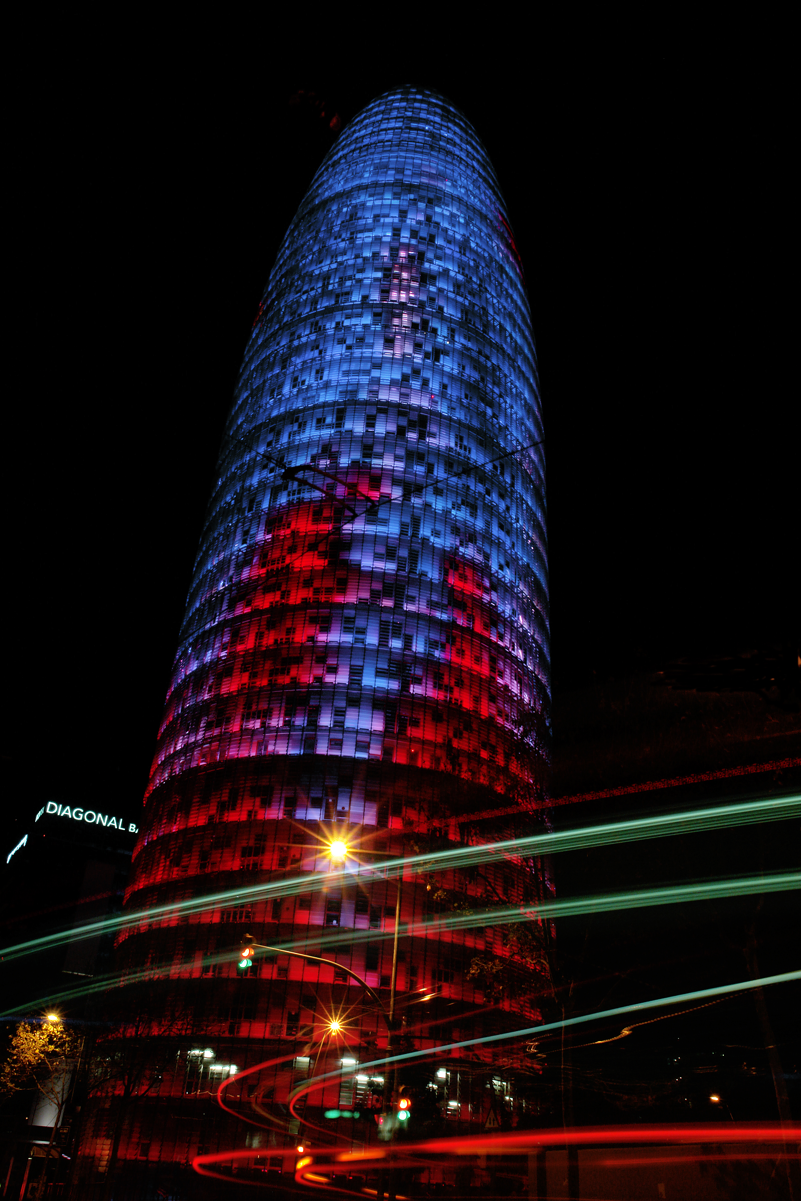 Foto nocturna de la Torre Agbar.